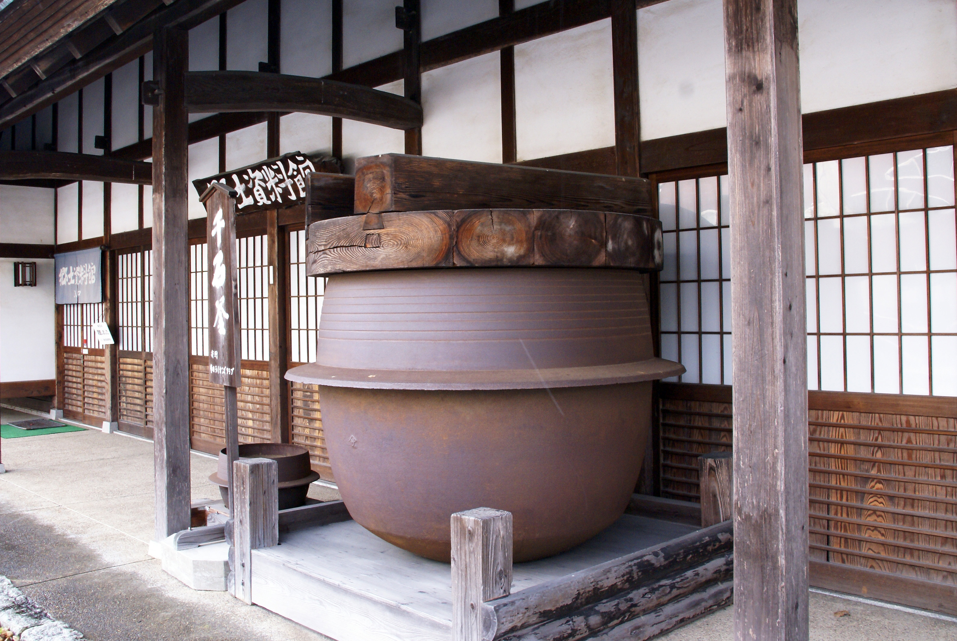 Kasuga Museum of History in Tamba, Hyogo, Japan